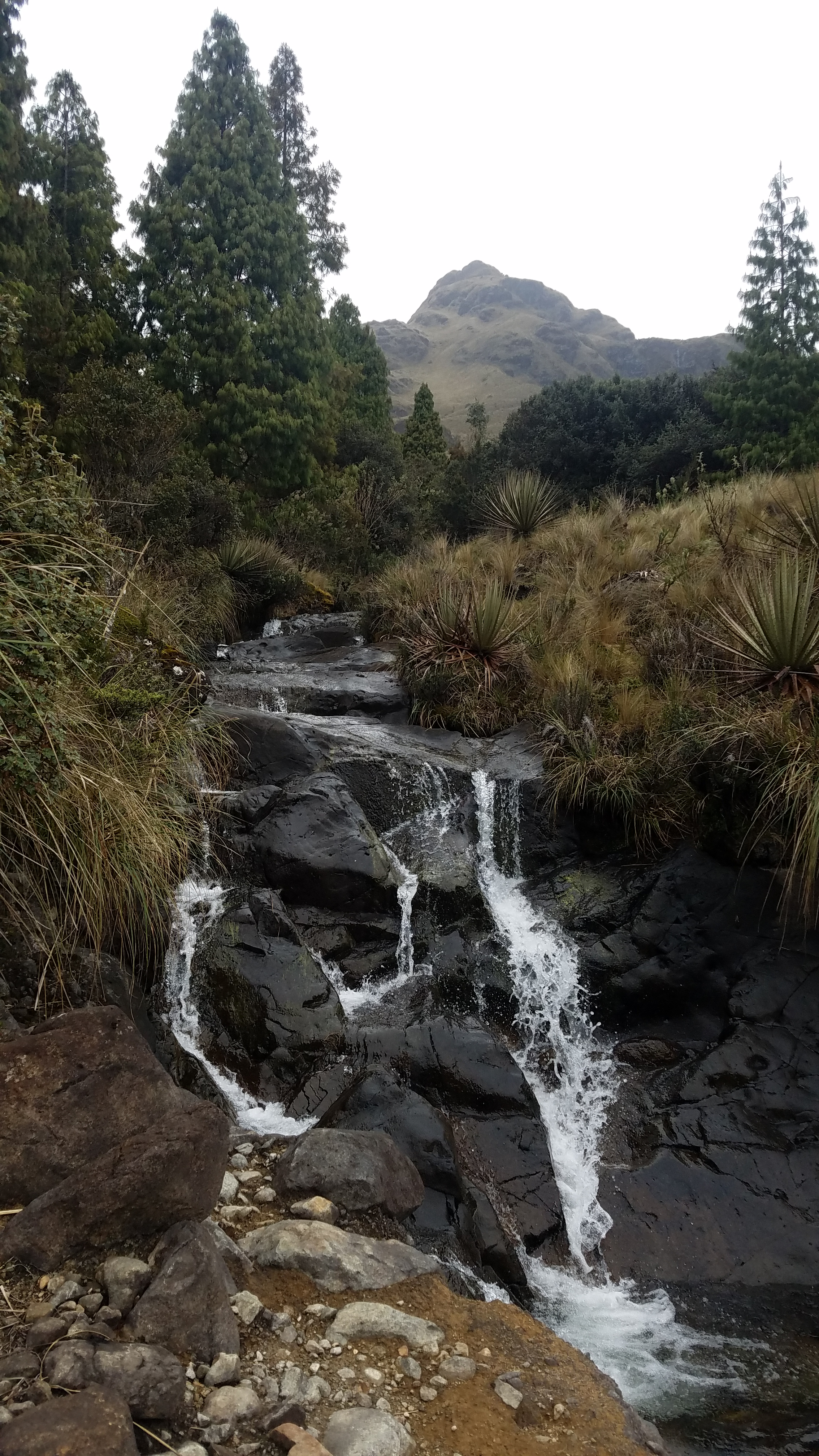 Caída de agua en medio de un bosque